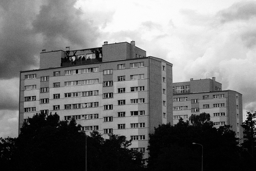 Łódź, wieżowce przy zbiegu ulic Pasjonistów i Grabieniec